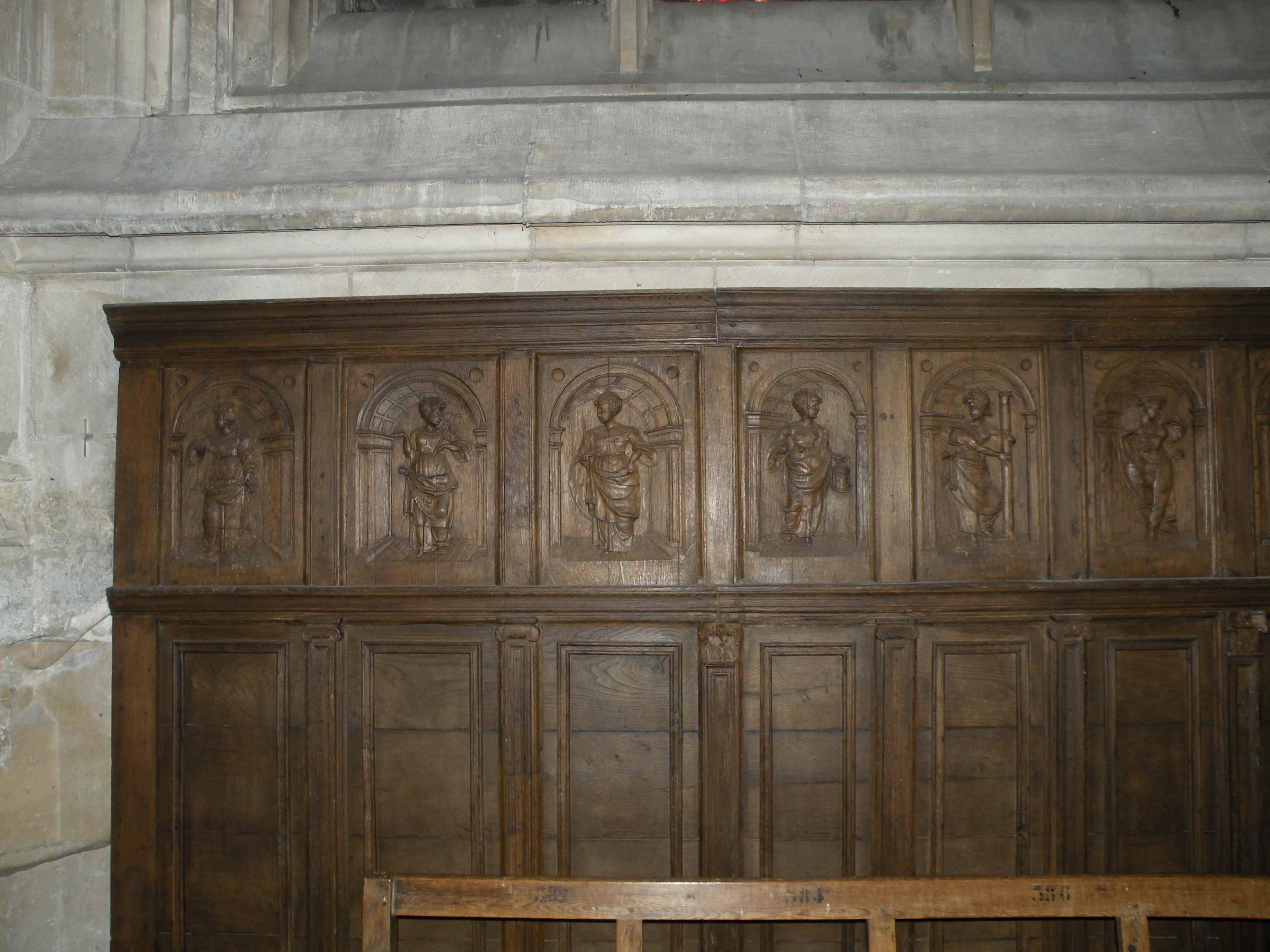 Panneau de bois sculptés du XVIe siècle de l'ancienne clôture du chœur dans l’Église Saint-Étienne de Beauvais